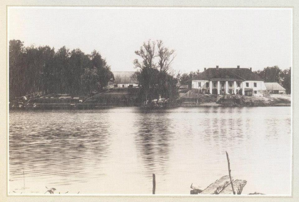 Беларуская (тарашкевіца): Відзы Лаўчынскія (Vidzy Łaŭčynskija)